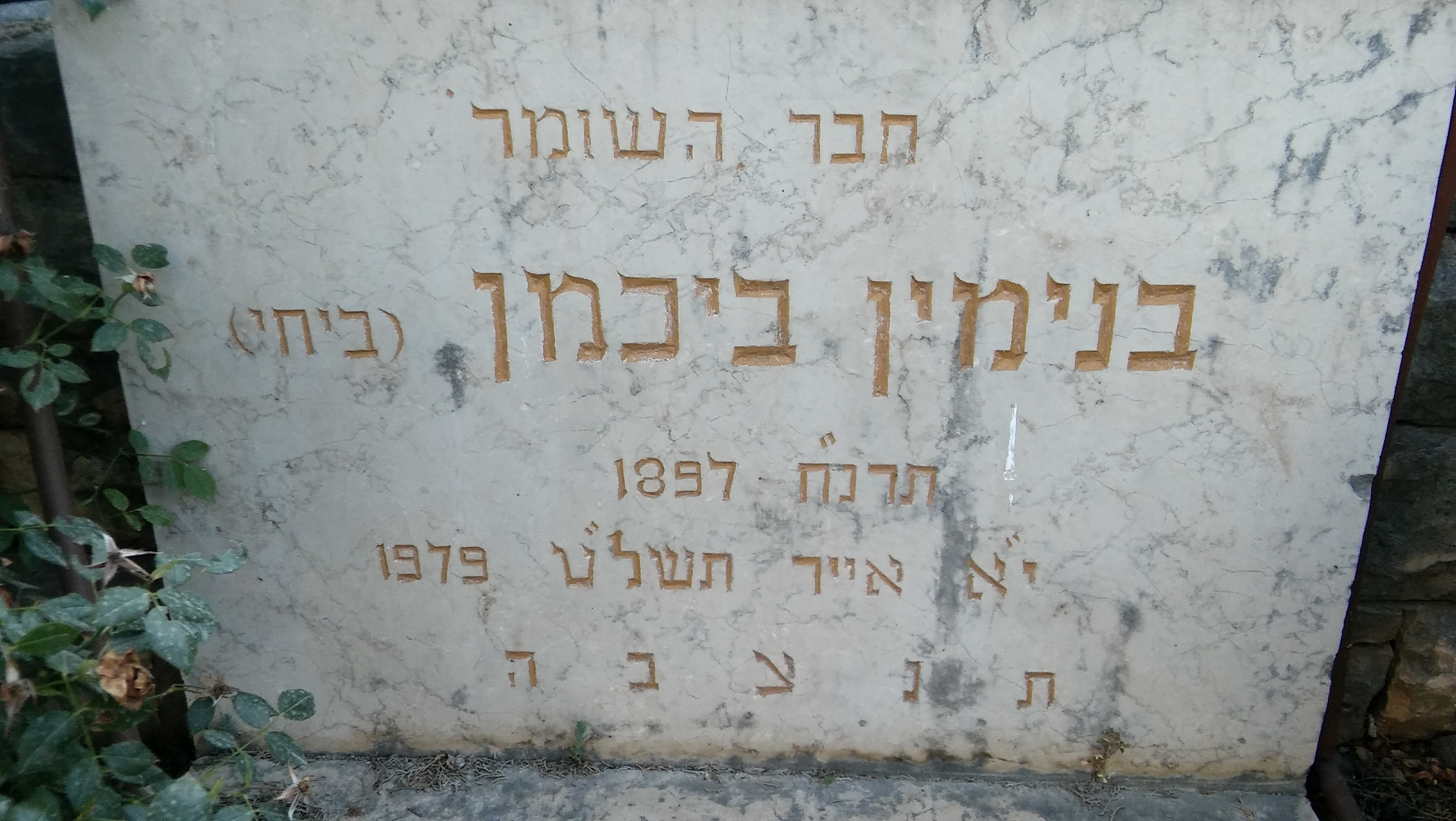 קברו של בנימין בוכמן בחלקת השומר בכפר גלעדי